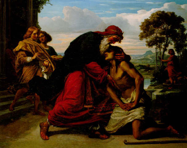 Die Rückkehr des verlorenen Sohns, Oil on Canvas